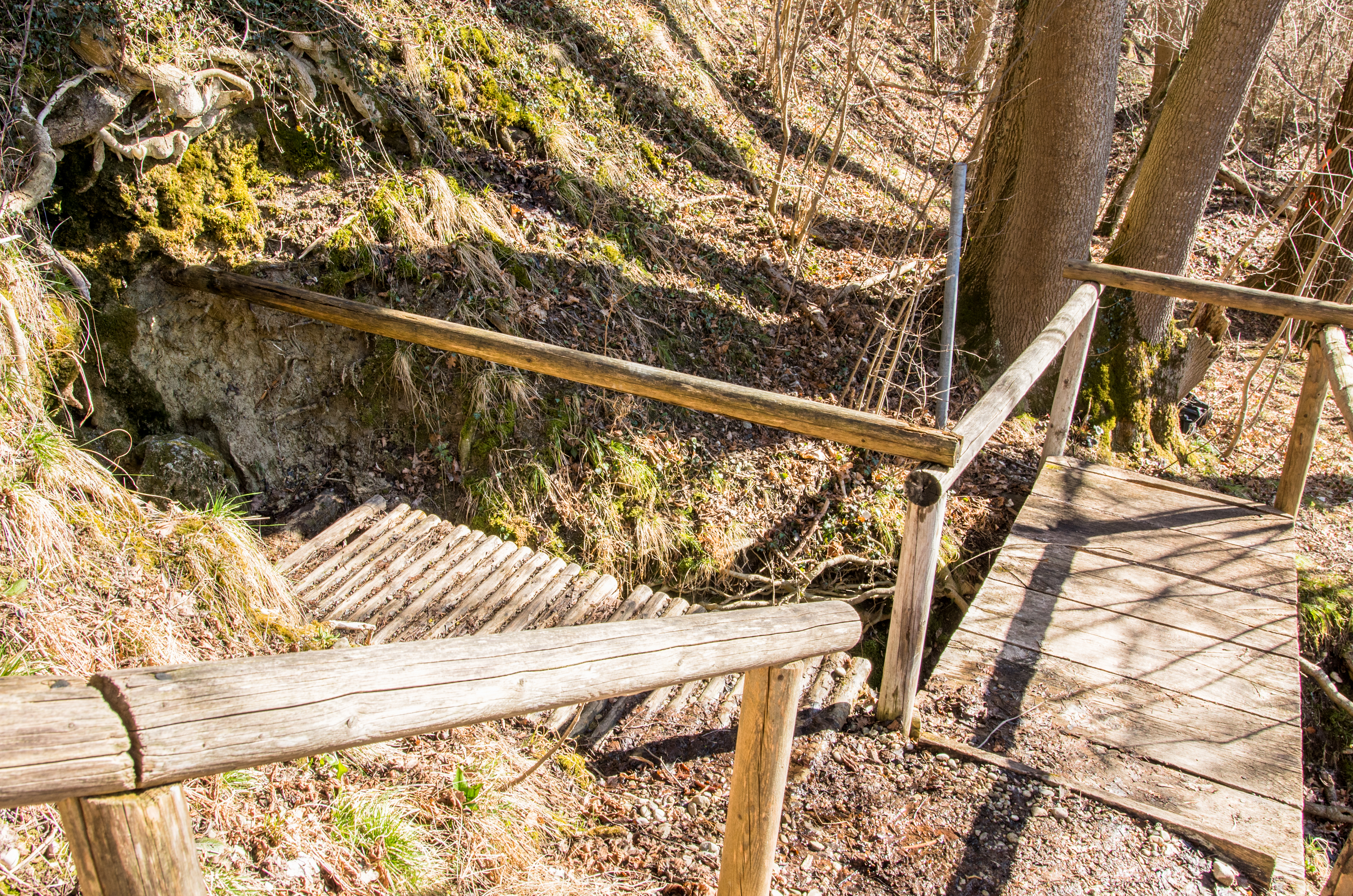 Geotop mit der Nummer 181R015; Naturdenkmal, hier: westlicher Quellaustritt liegt westlich der St.Leonards-Kapelle in Kaufering, Zugang über südlichen Rand der Wiese hinter Parkplatz dort, links der Grotte, FFH-Gebiet, Naturdenkmal, Landschaftsschutzgebiet. Wegen der besonderen Empfindlichkeit von Steinernen Rinnen ist der eigentliche Rinnenablauf an dieser Stelle gegen weiteres Betreten durch Geländer geschützt.